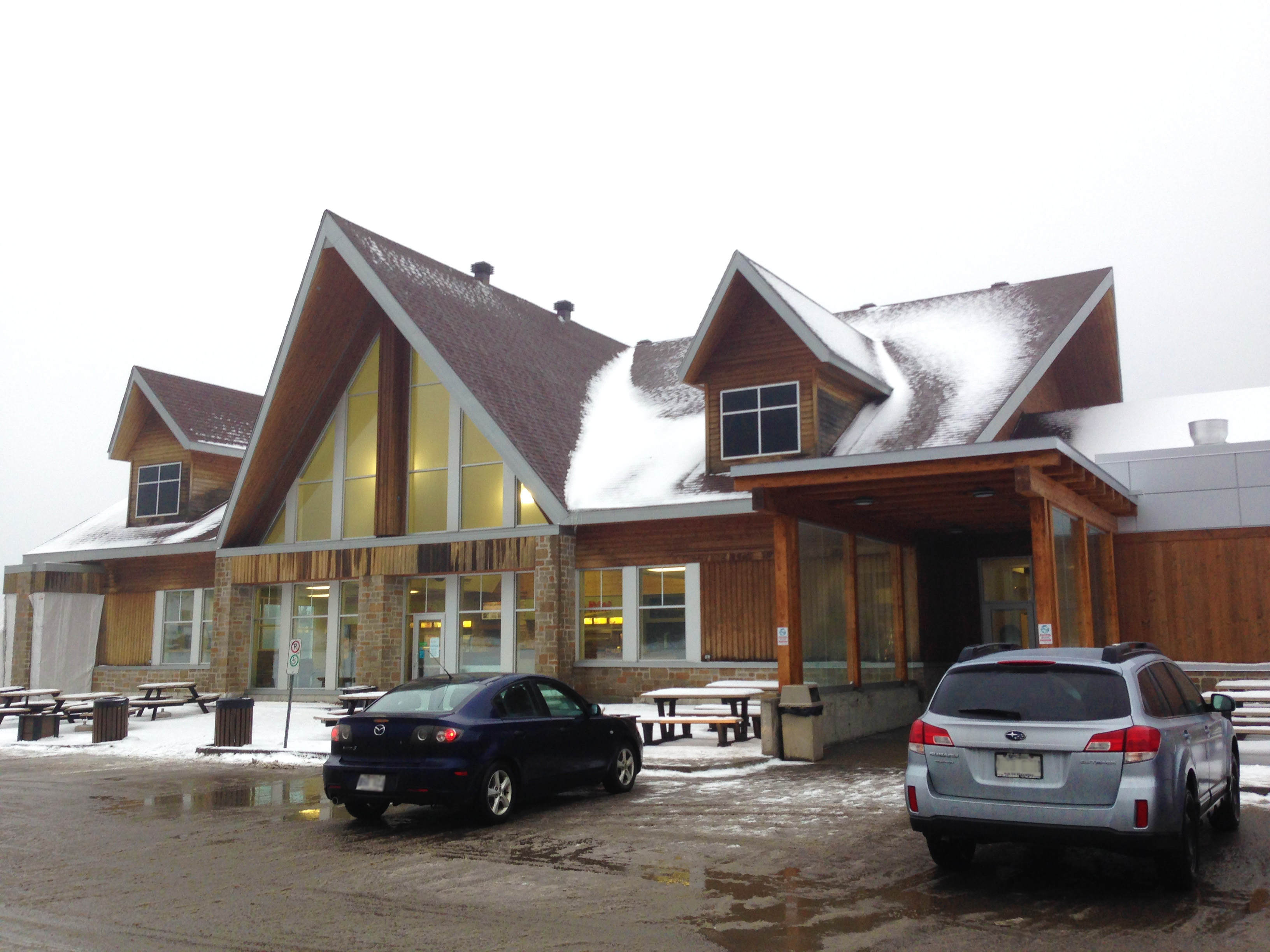 La halte routière L'Étape, dans la réserve faunique des Laurentiques, en décembre 2015.